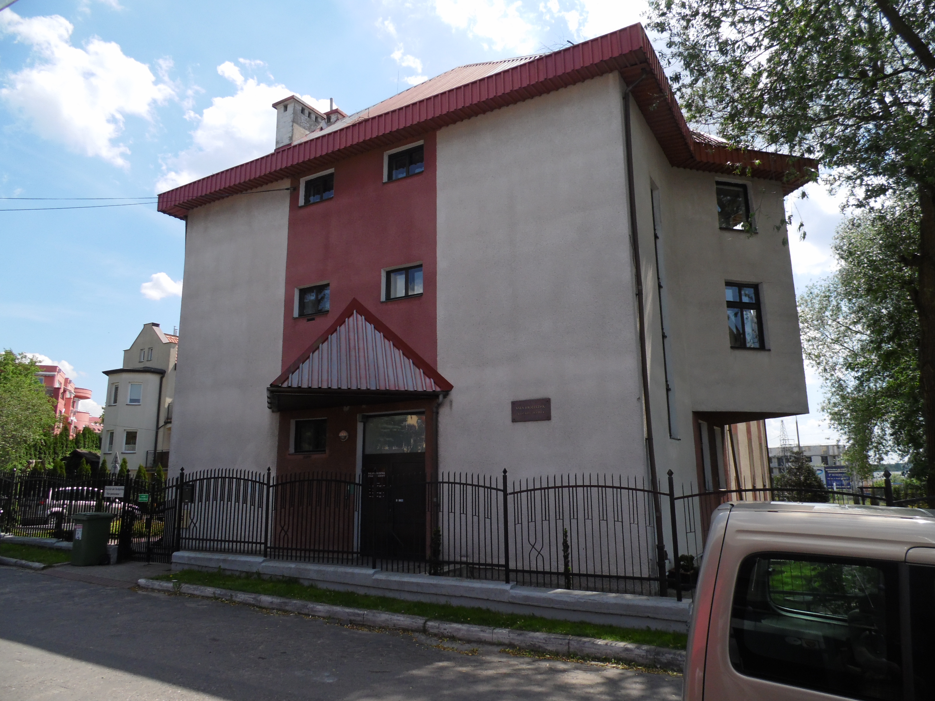 Olsztyn. SALA KRÓLESTWA ŚWIADKÓW JEHOWY PRZY UL. TRAUGUTTA